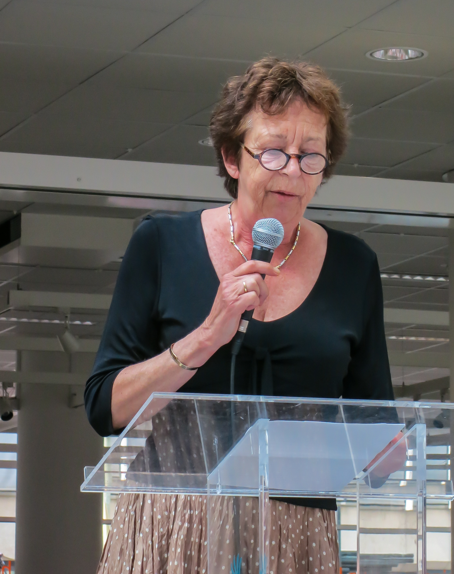 Renate Dorrestein tijdens de opening van expositie DIS, nav het gelijknamige gedicht van Jean Pierre Rawie, in het Atrium te Den Haag